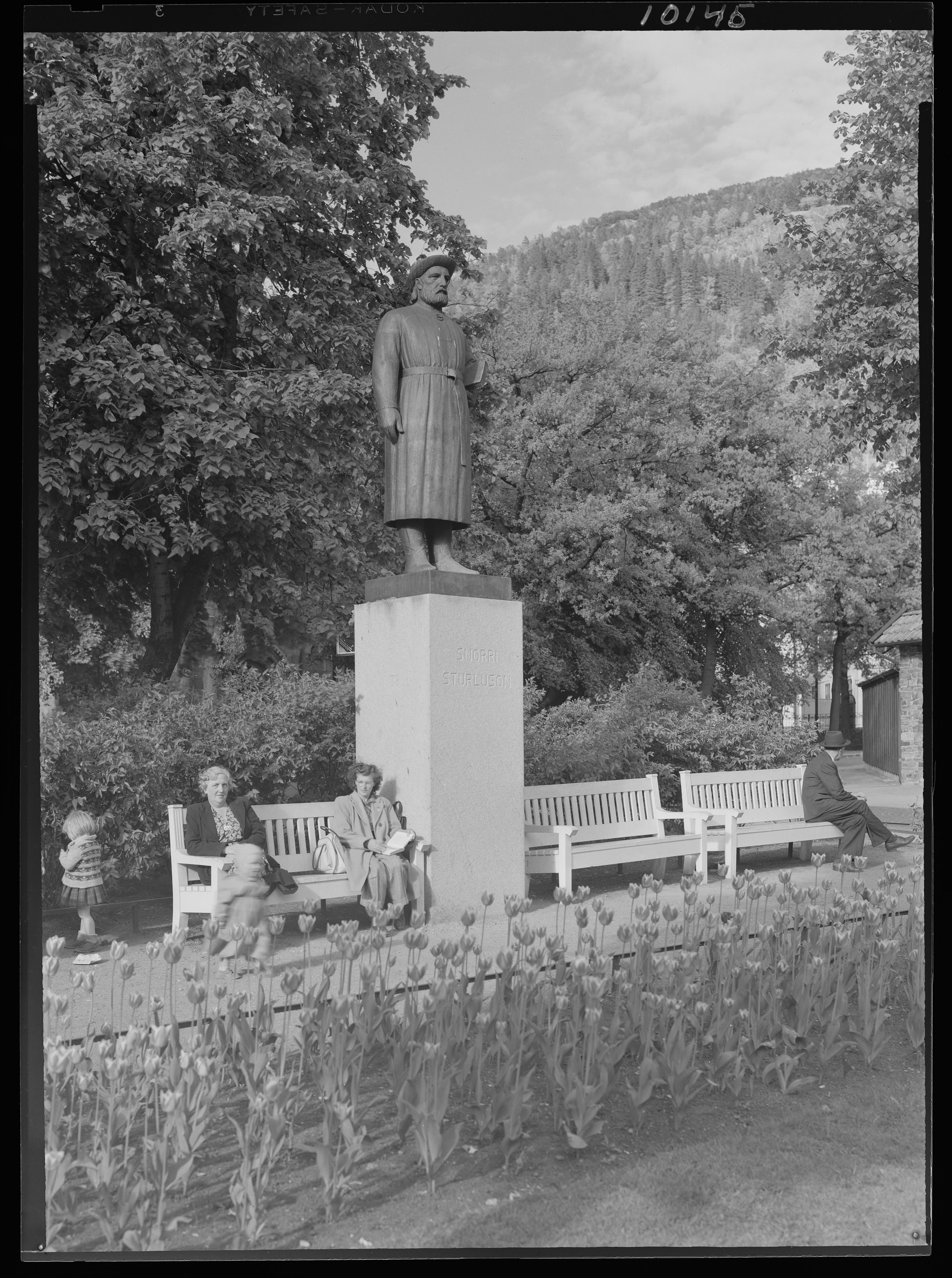 Bildet er hentet fra Nasjonalbibliotekets bildesamling. Anmerkninger til bildet var: Fotograf : ukjent